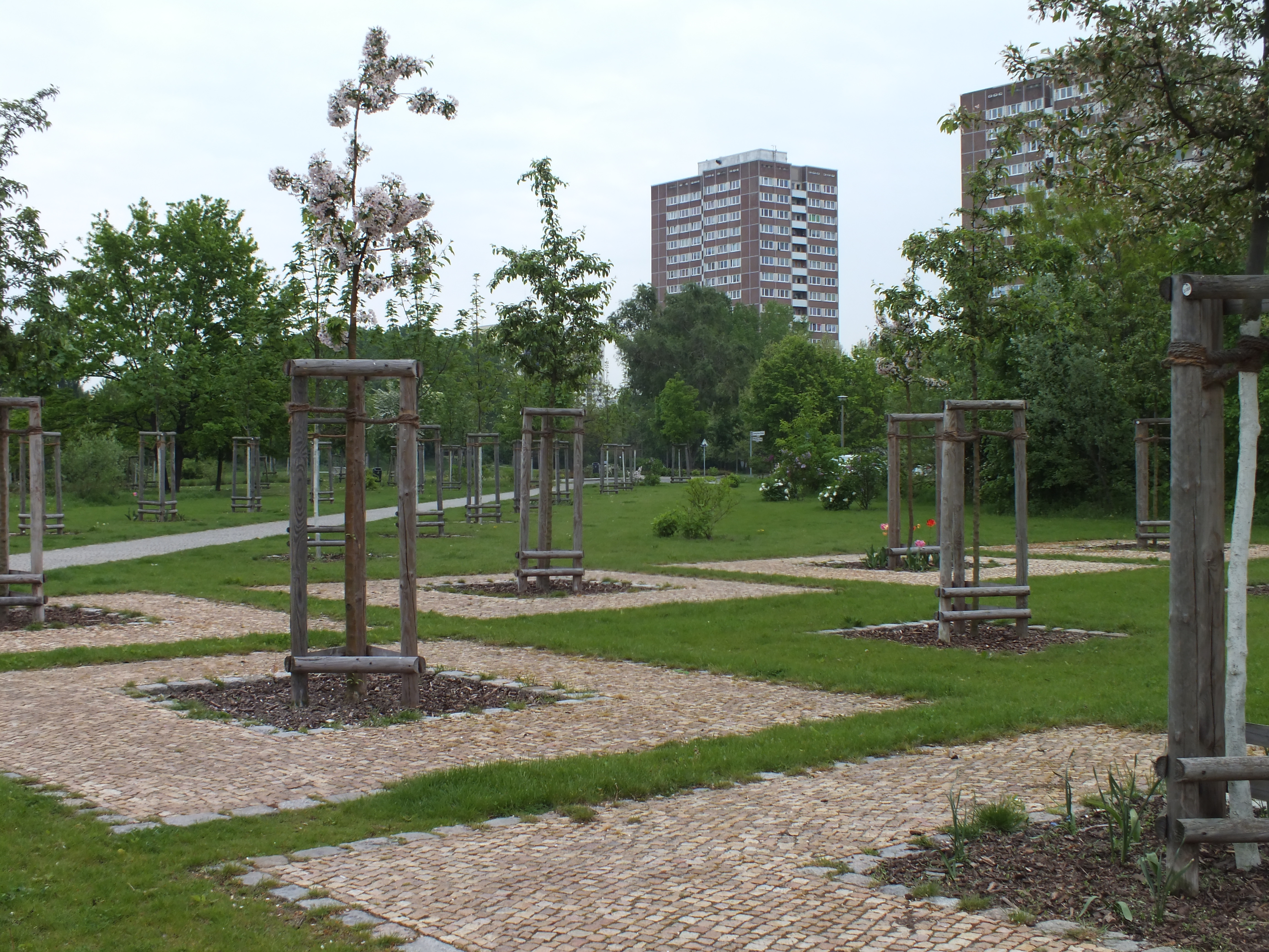 Hochzeitspark